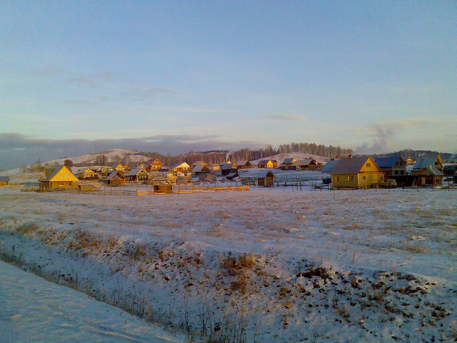 Абзаково